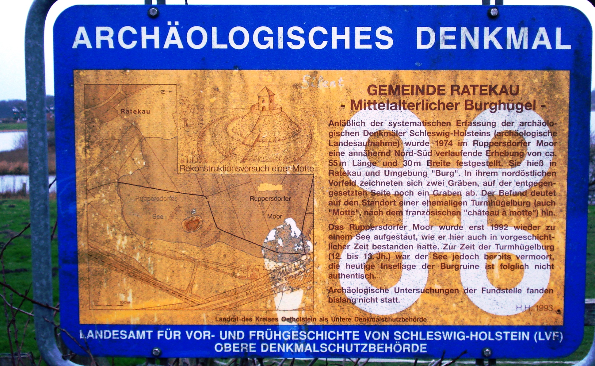 Infotafel zur Burg im Ruppersdorfer See in Ratekau